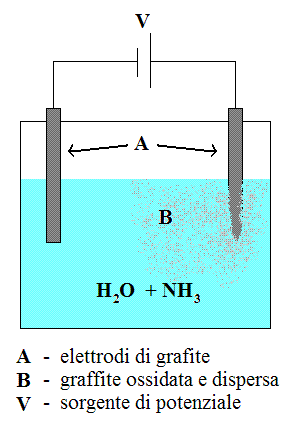 Schema di esempio di cella elettrolitica per la produzione di ossido di grafite